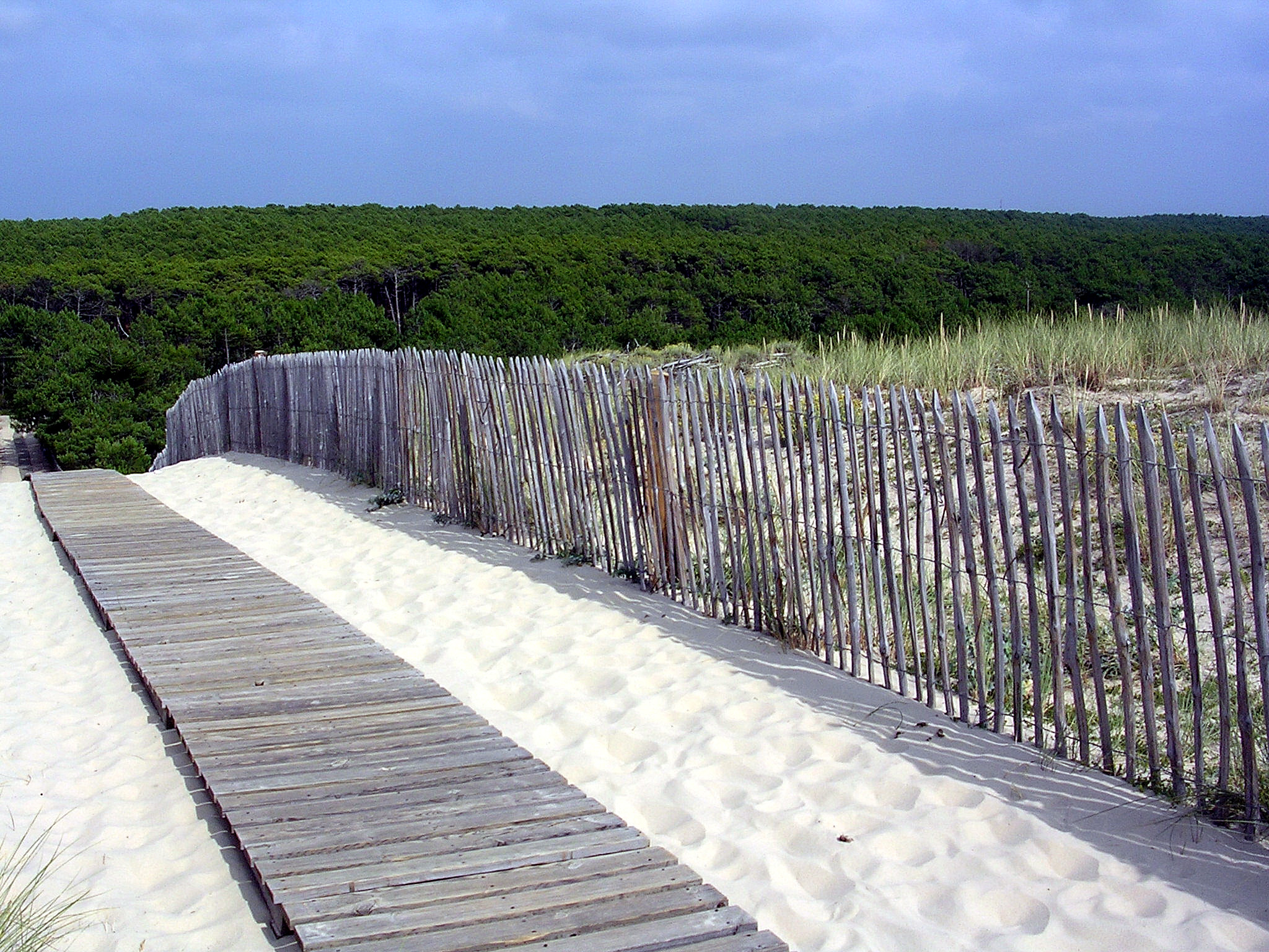 Vue de la dune sur la forêt de Mimizan (Landes, France). Photo prise par Jibi44 en juillet 2006